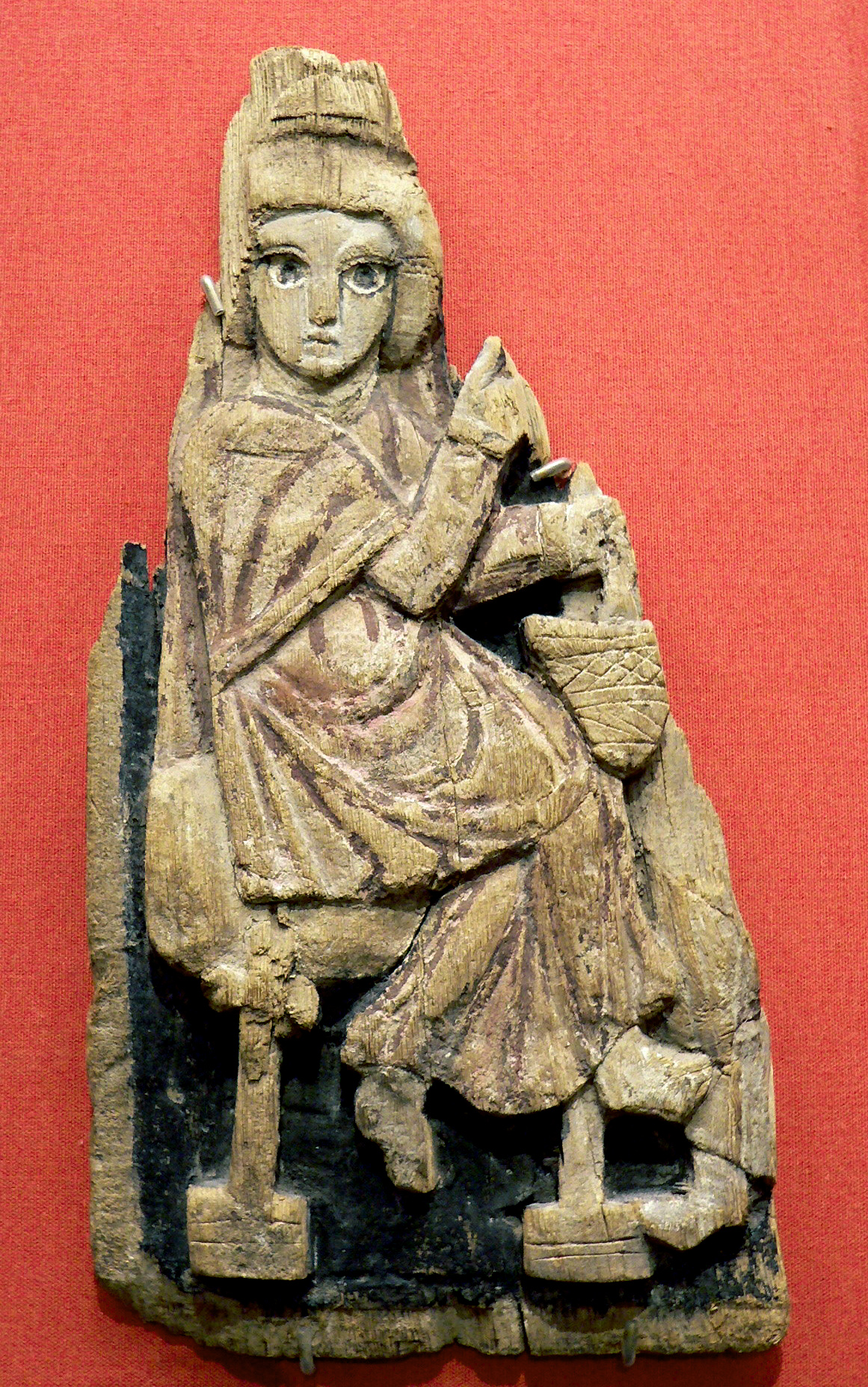 Panneau de la Vierge à l'Annonciation. Fin du Ve siècle ap. J.-C. Bois de figuier peint. Pr.: 2 cm. La Vierge filait la laine pourpre pour le voile du Temple lors de l'apparition de l'archange Gabriel.